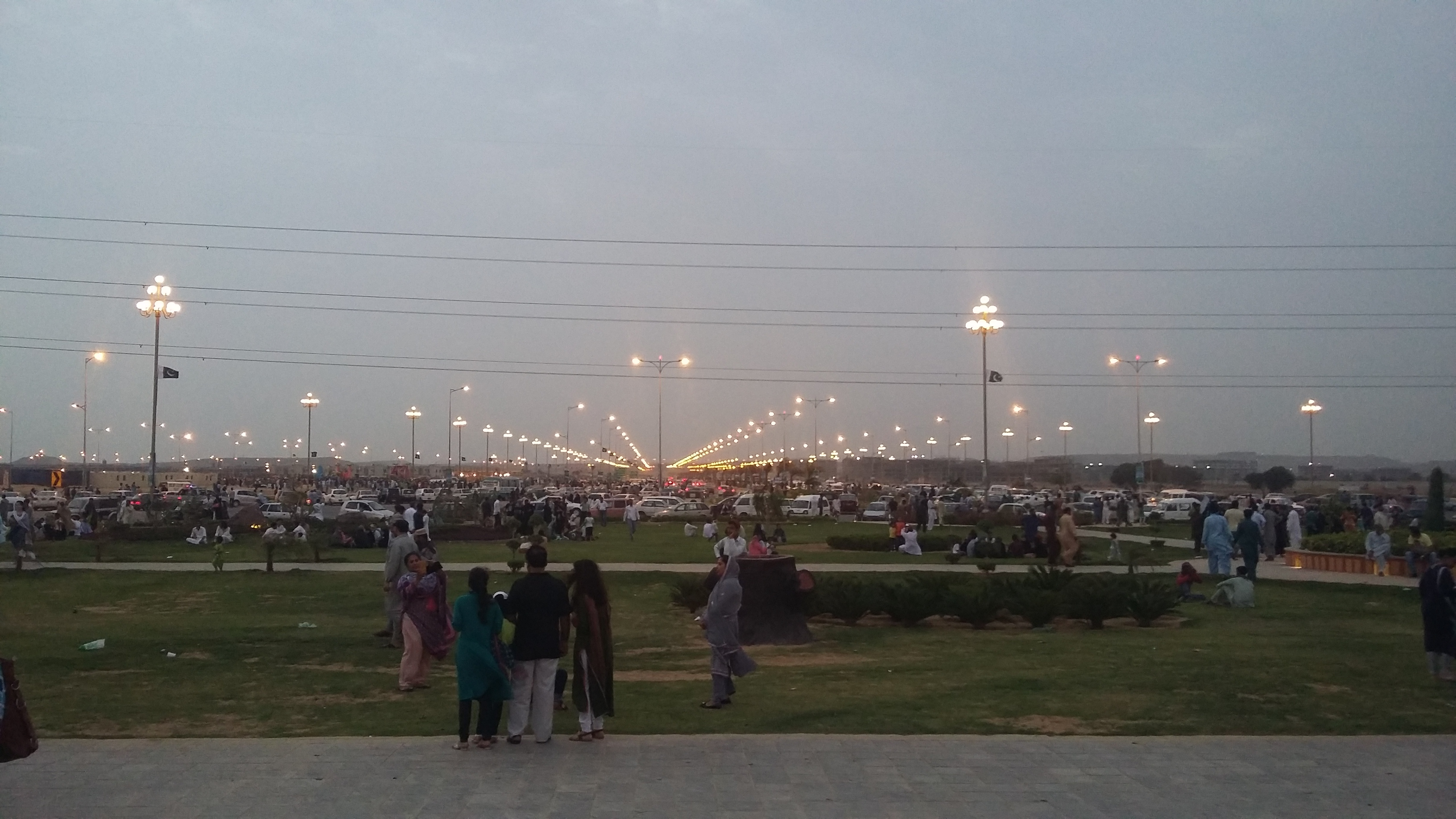 Bahria Town Karachi, Pakistan